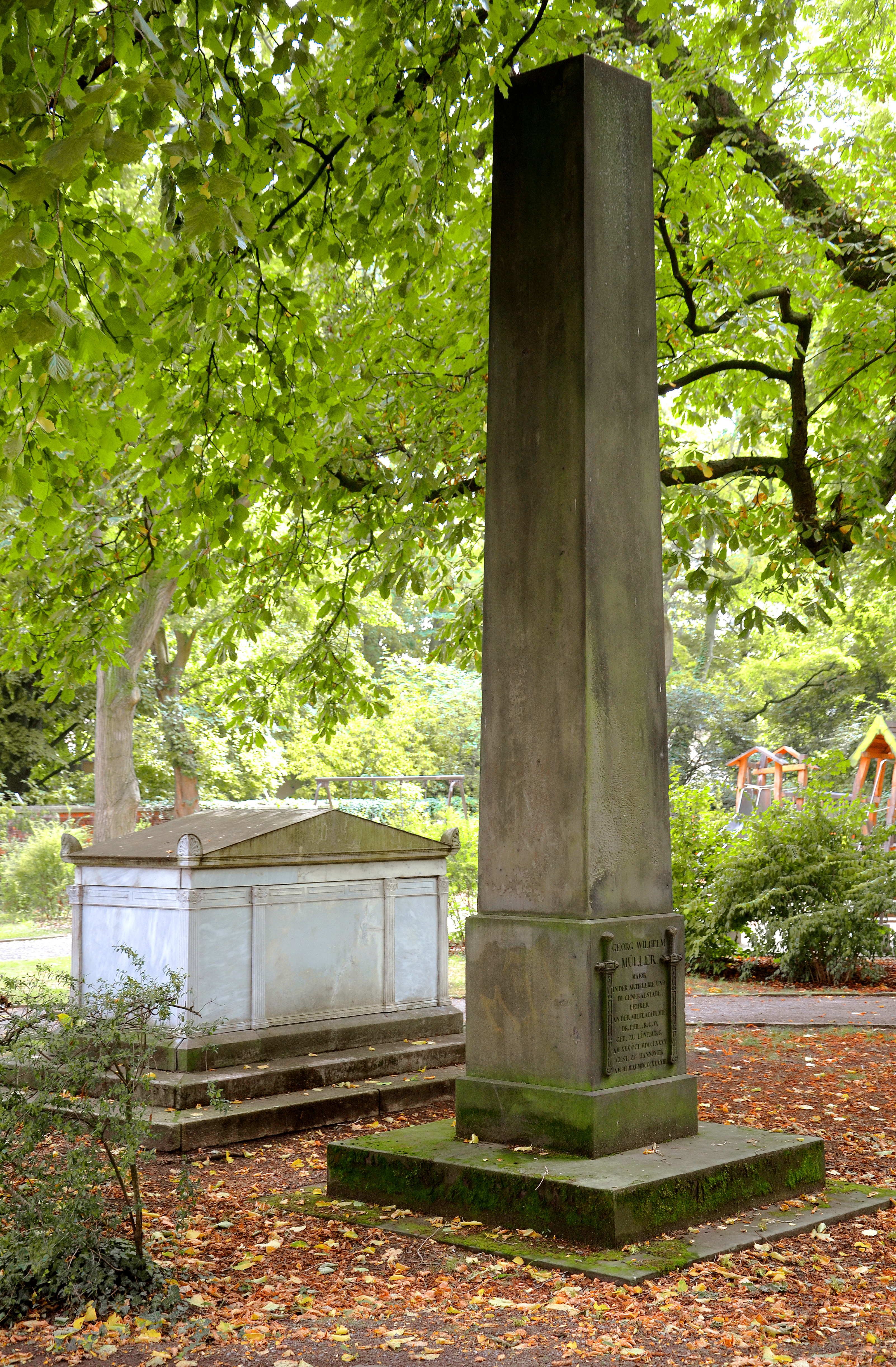 Der vergleichsweise riesige Obelisk auf dem Gartenfriedhof in Hannover als Grabstein des Geodäten, Ingenieurmajors, Majors in der Artillerie und im Generalstab sowie Lehrer an der Militärakademie zu Hannover, Dr. Phil. Georg Wilhelm Müller (1785-1843) ...